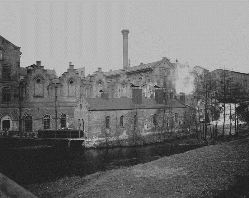 Hjula Væverier